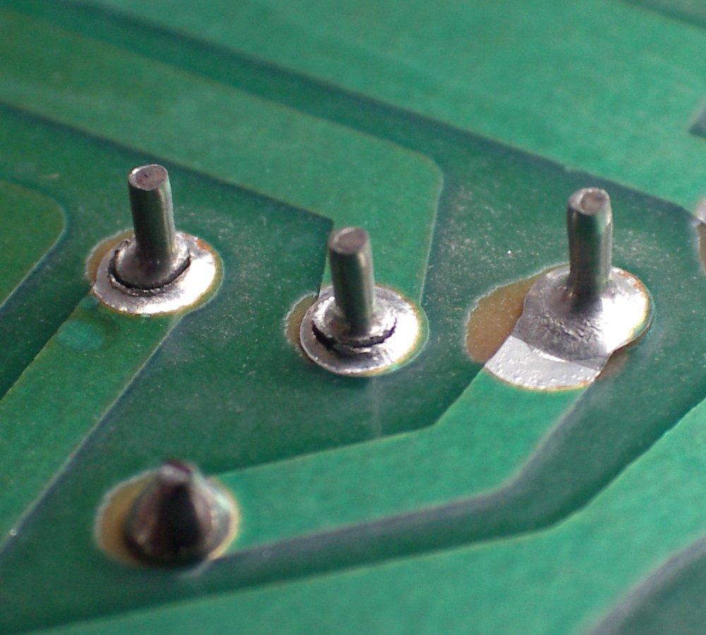 Zwei gebrochene Lötstellen an einem Zeilentrafo (links), eine delaminierte Leiterbahn (rechts)